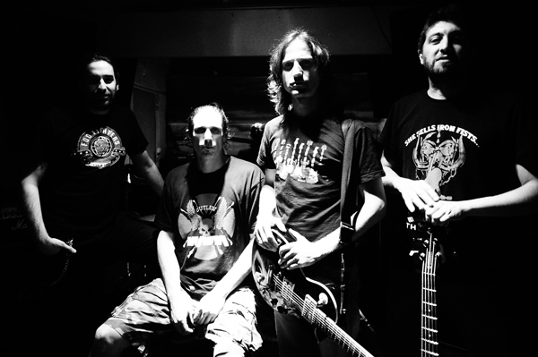 FotoCrepar